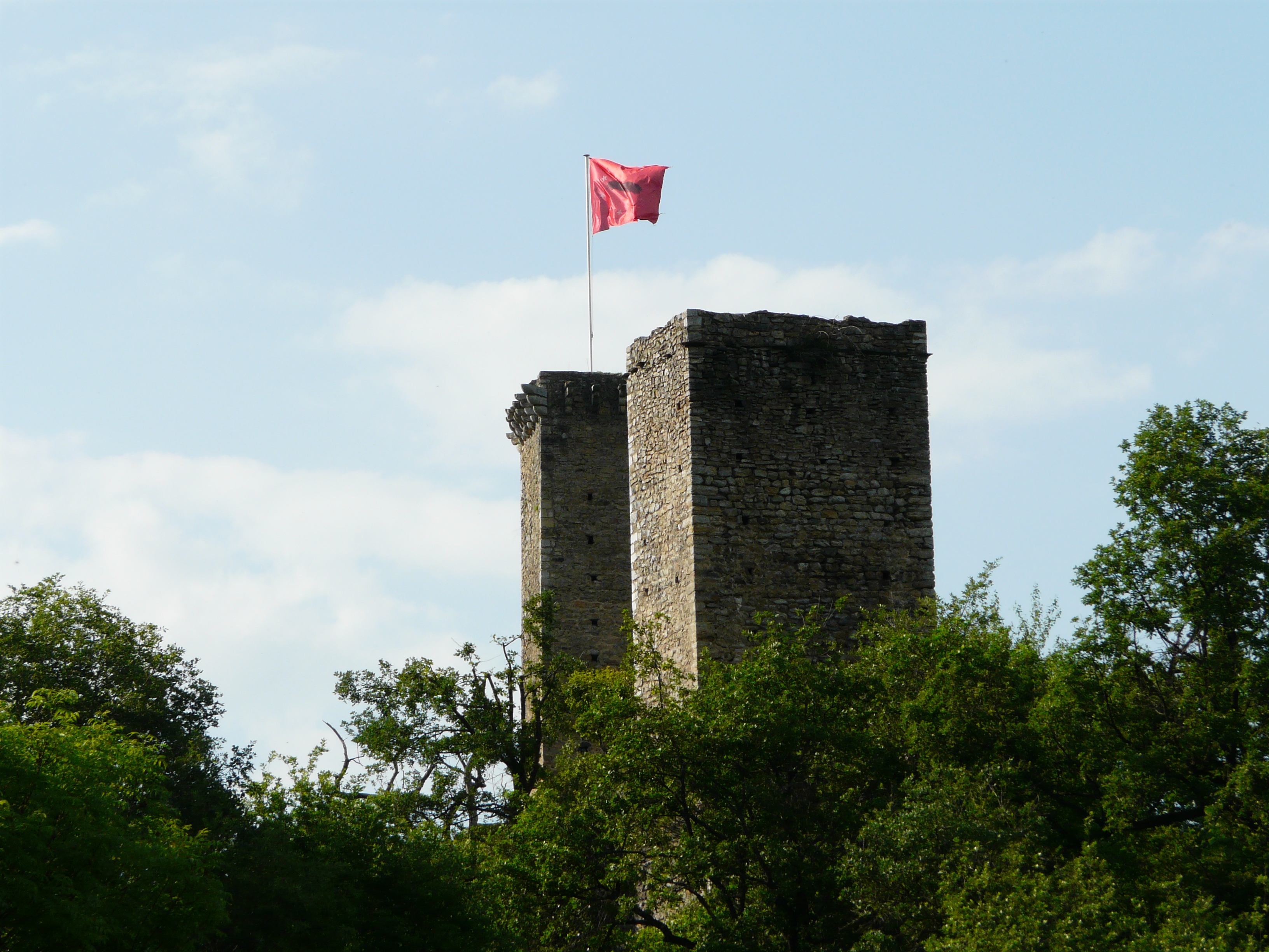 Le château de Beaucens, Hautes-Pyrénées, France.